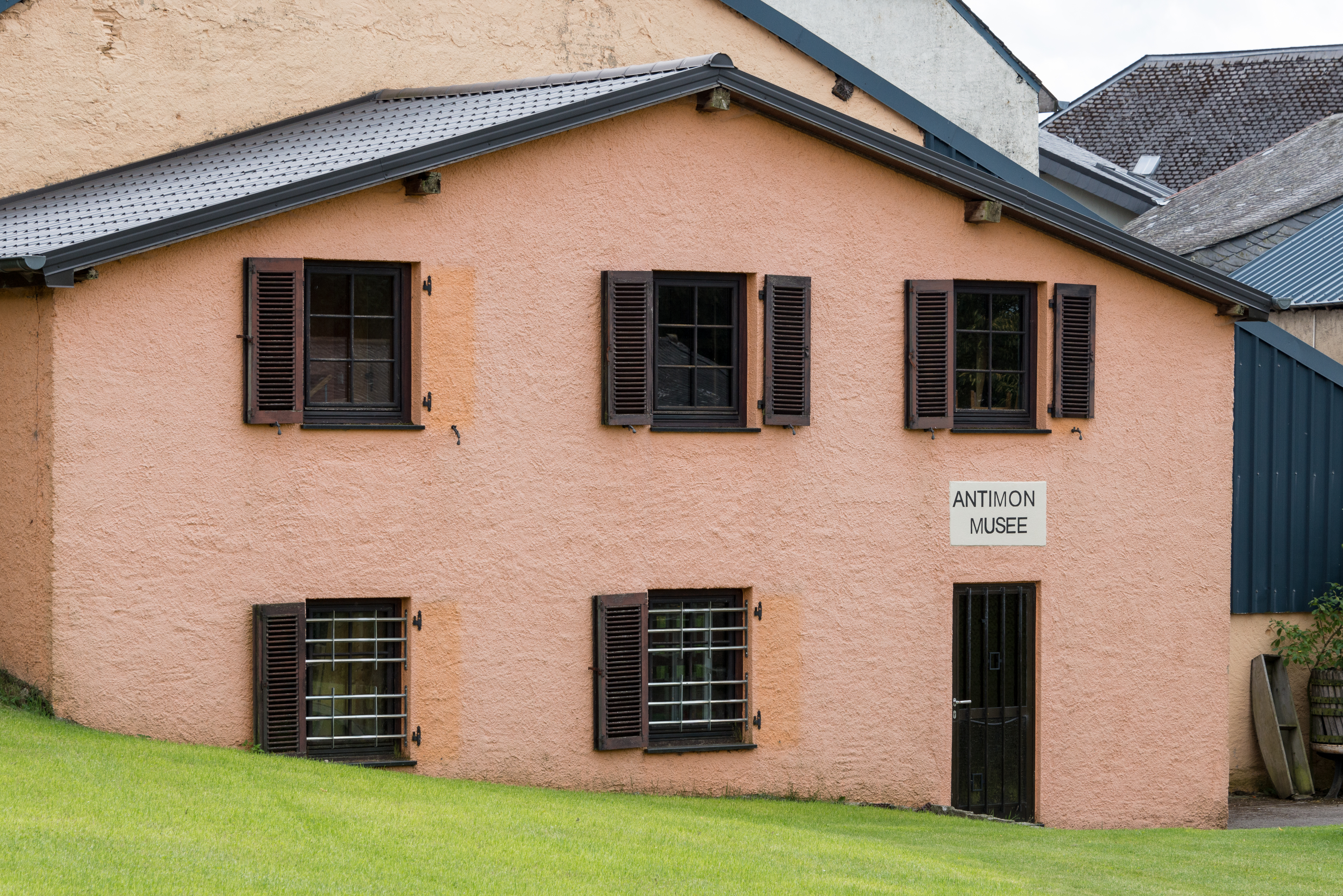 Den Antinim-Musée an der Moettelsergaass zu Géisdref.